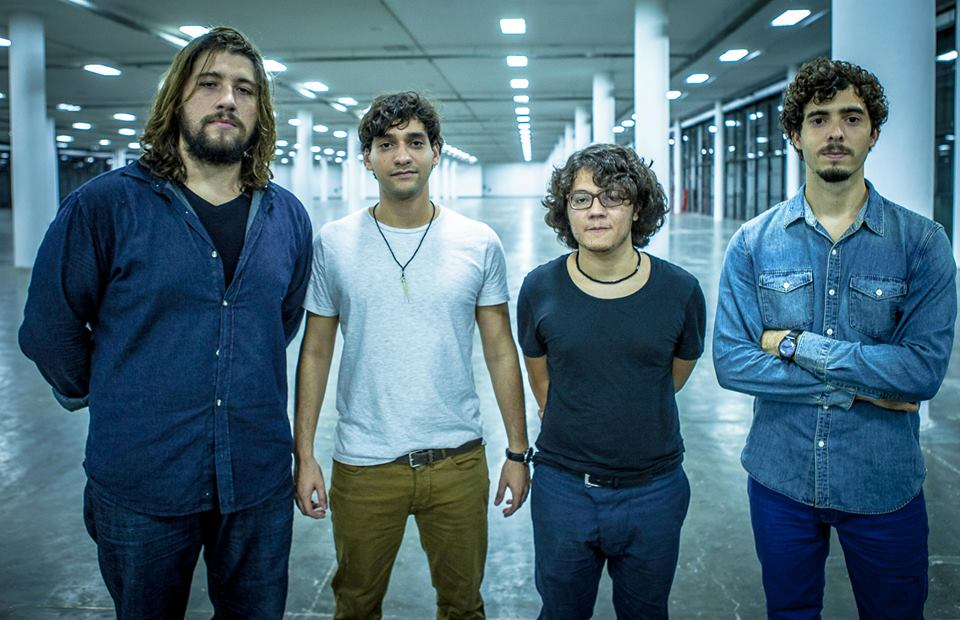 Selvagens á Procura de Lei em 2013, no local da gravação do videoclipe (Brasileiro)